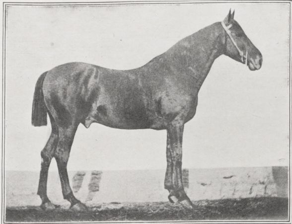 L'étalon fondateur Conquérant, ancêtre de la race du trotteur français, né en 1858